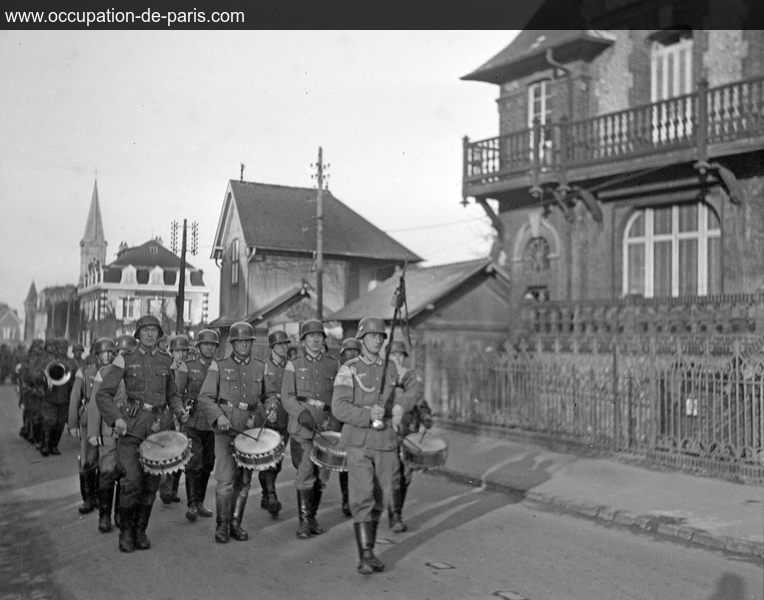 Parade fanfare allemande Houlgate rue des Bains 1941